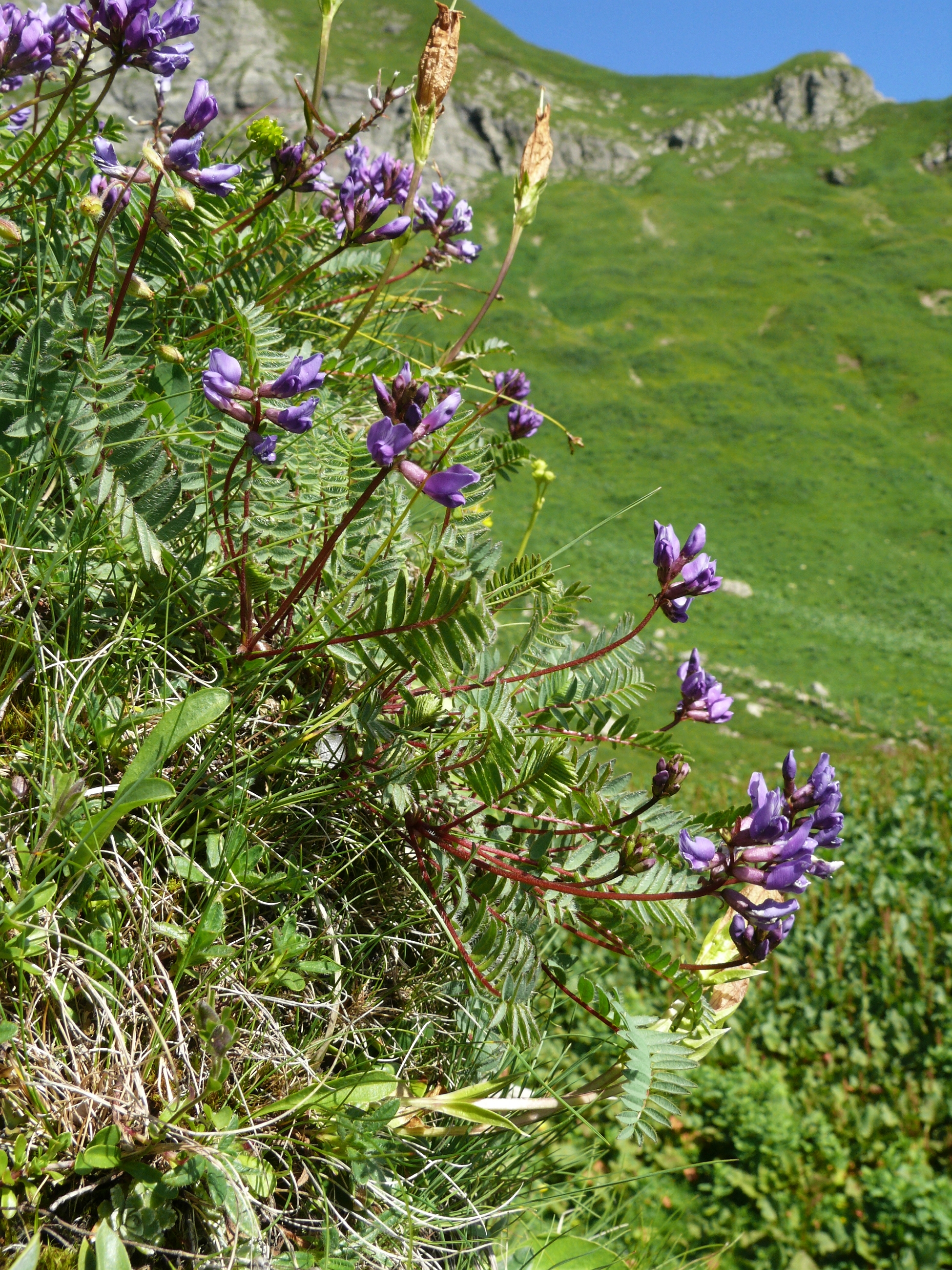 Oxytropis jacquinii, Allgäuer Alpen, Deutschland